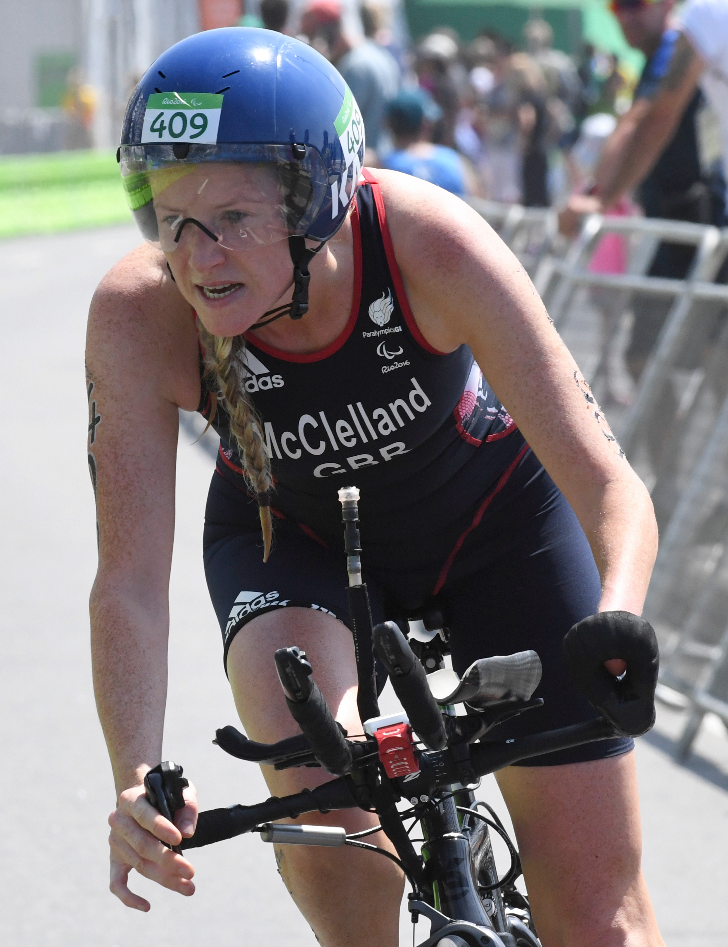 Rio de Janeiro - Provas de triatlo feminino PT4, PT2 e PT5, em Copacabana.